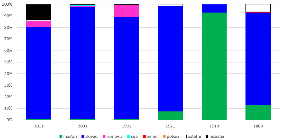 Jazykové a etnické zloženie obce Plavé Vozokany.